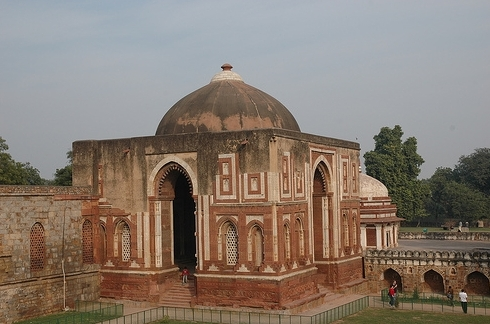 Quwwat-ul-Islam, vieille mosquée de Delhi